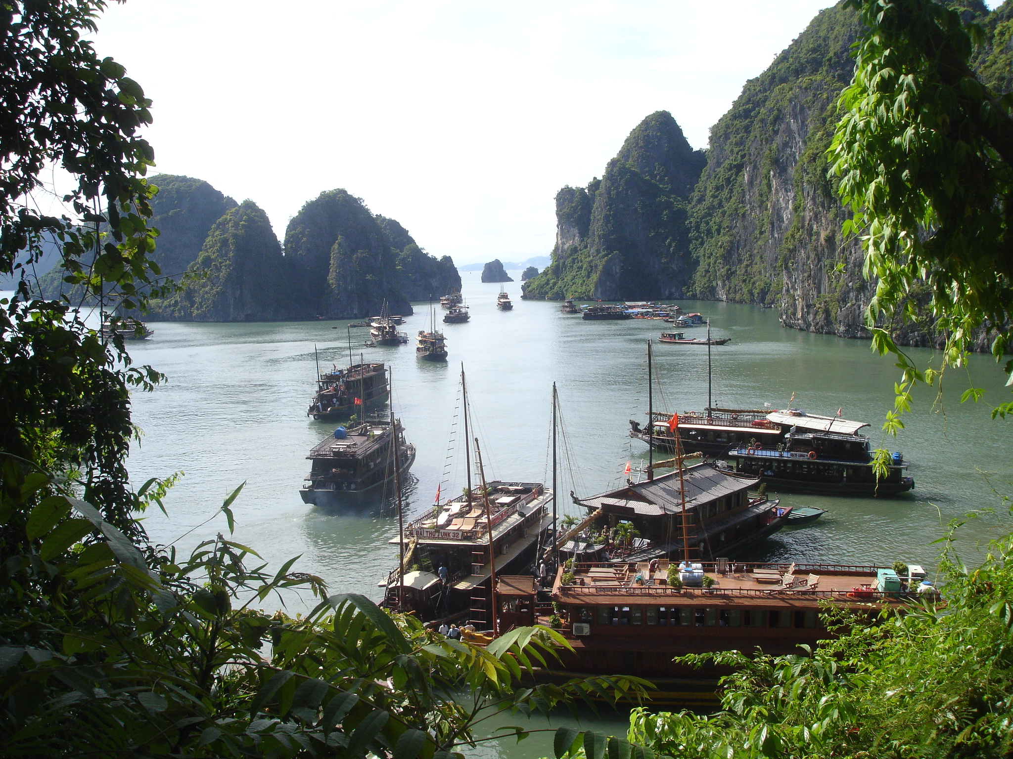 Ha Long Bay, a World Heritage Site.